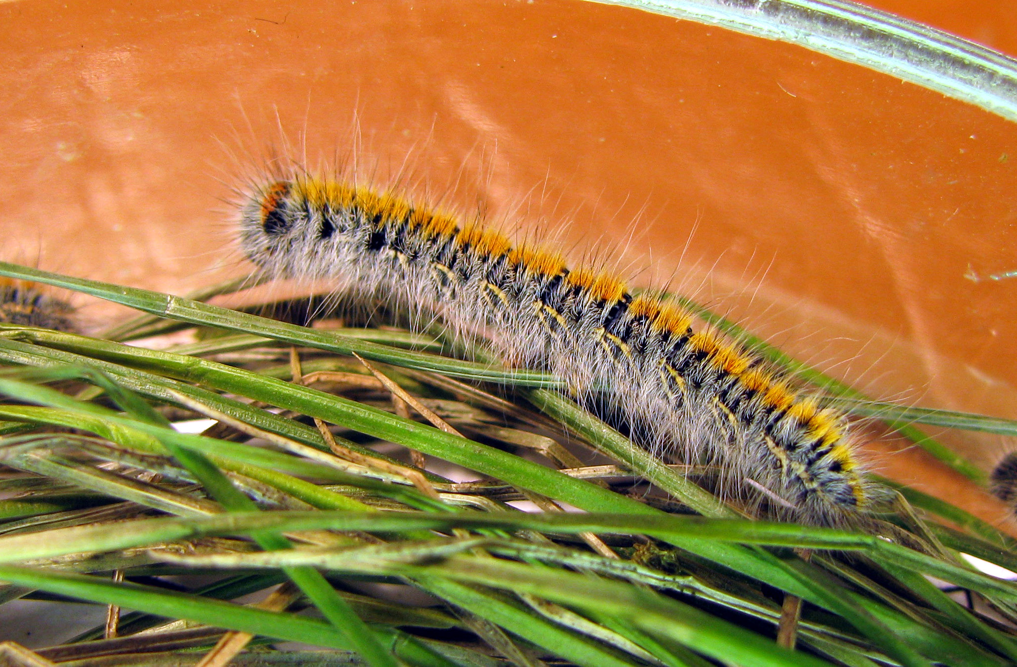 Lasiocampa trifoli larva